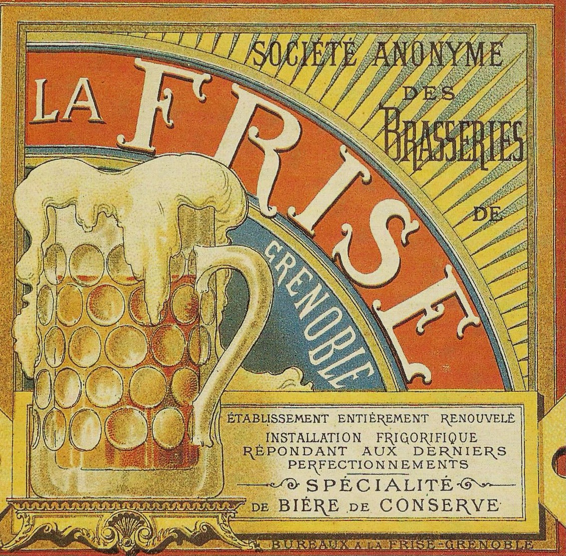 Réclame pour la bière de la Brasserie de la Frise à Grenoble. Date: vers 1891.